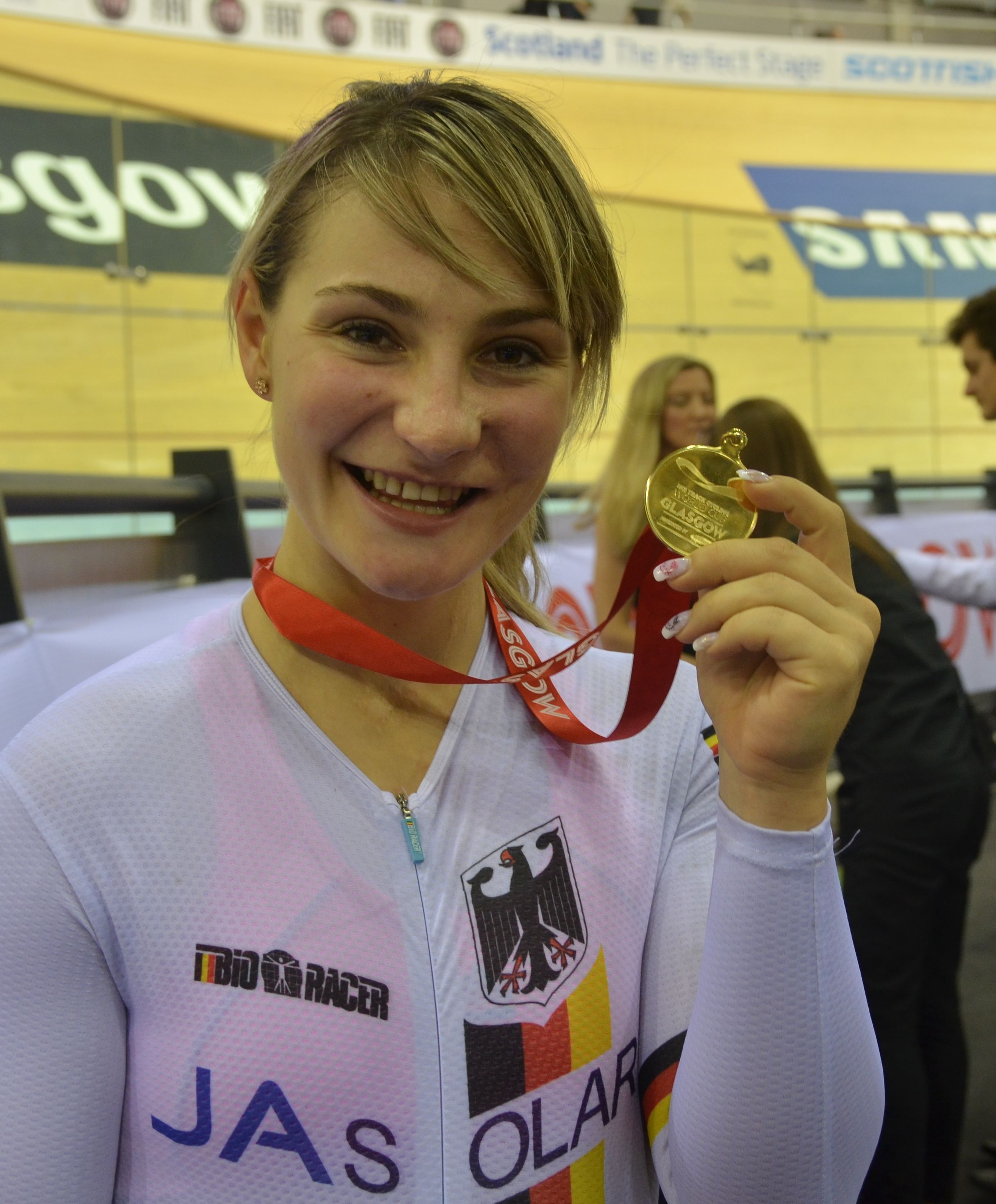 Kristina Vogel, Siegerin im Sprint, Bahnrad-Weltcup 2012 in Glasgow